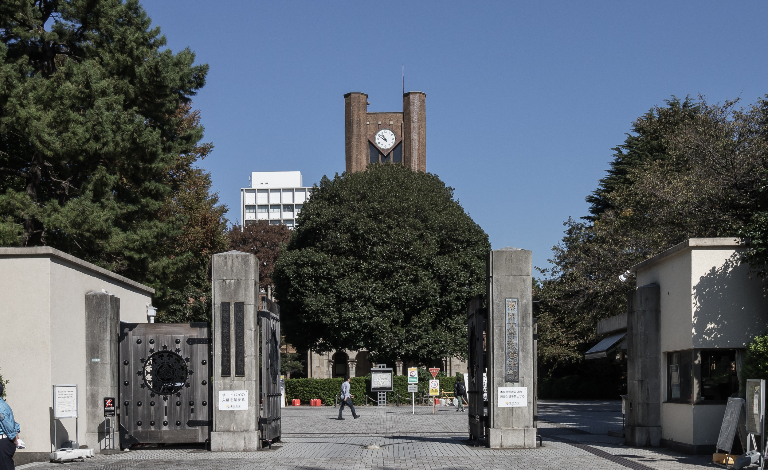 東京大学駒場Iキャンパス正門(東京都目黒区)。旧第一高等学校本館。内田祥三設計（1931）